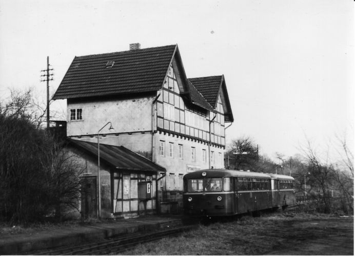 Verbrennungstriebwagen der Baureihe 798 im Bahnhof Vernawahlshausen.